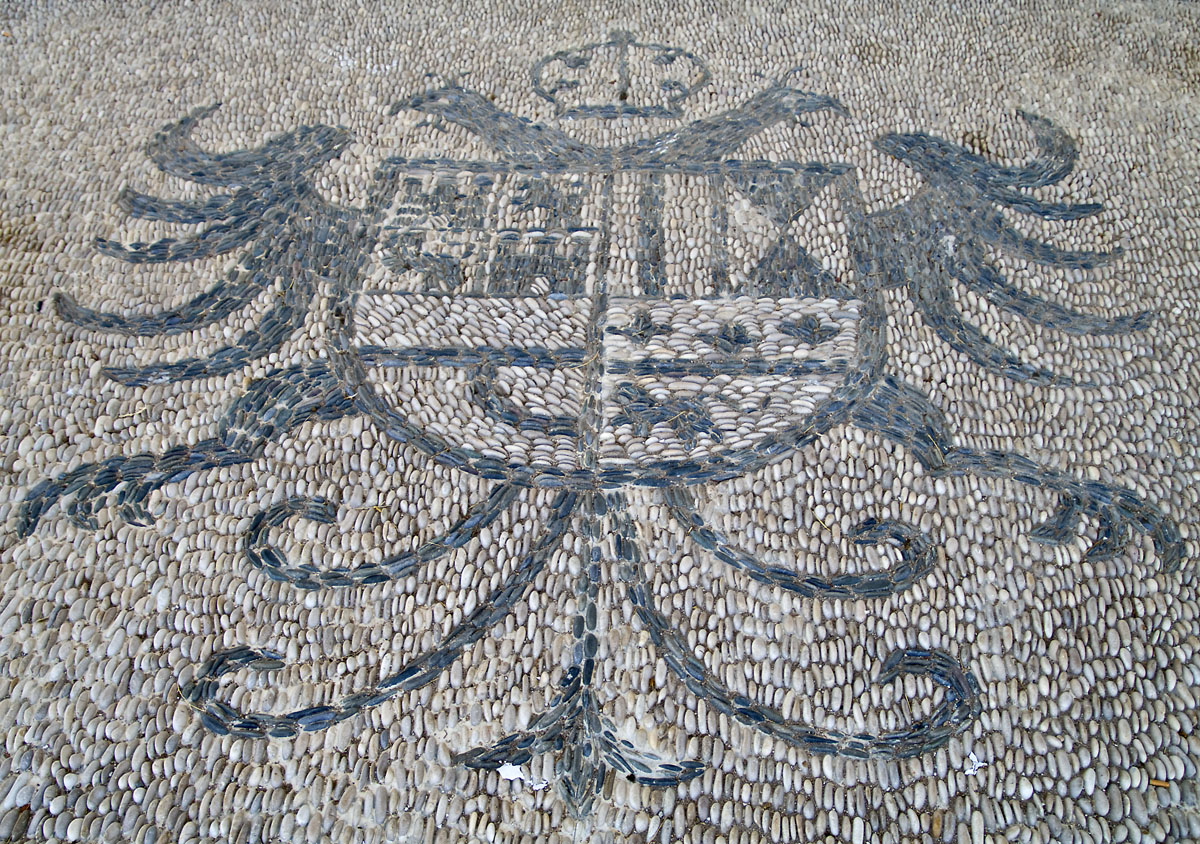 Escudo de Villanueva de Córdoba ubicado ante la fachada principal de la iglesia de San Miguel Arcángel de Villanueva de Córdoba.